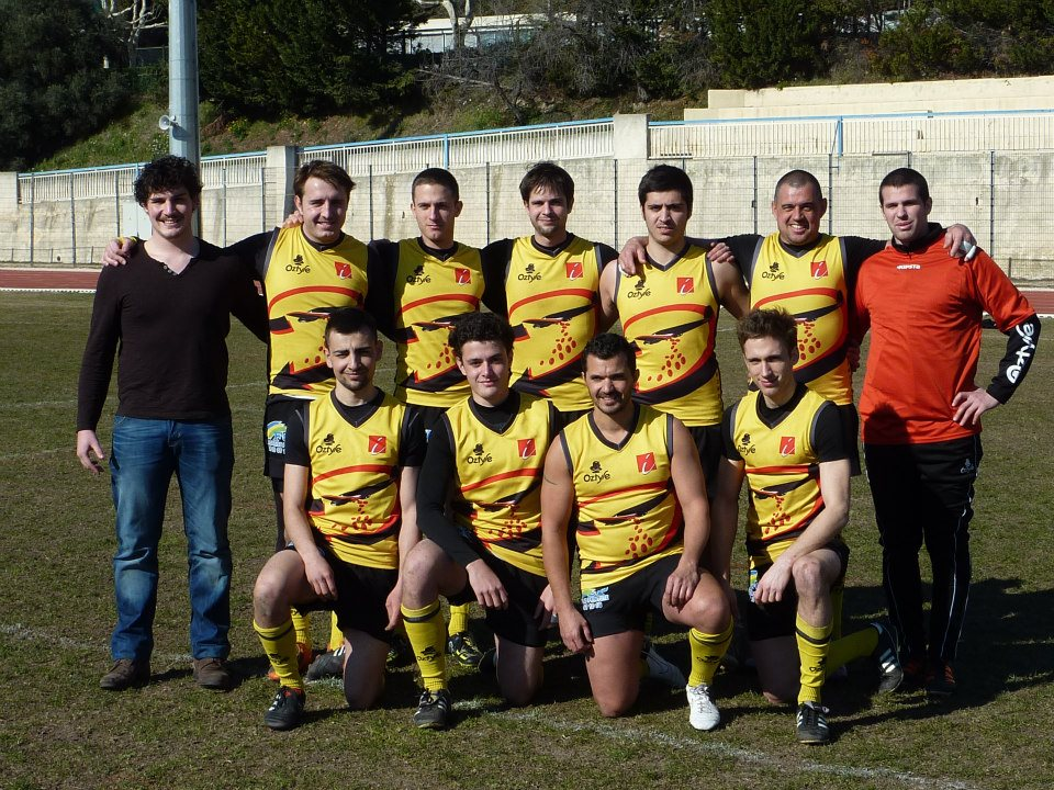 Coupe Grand Sud 2013 à Marseille